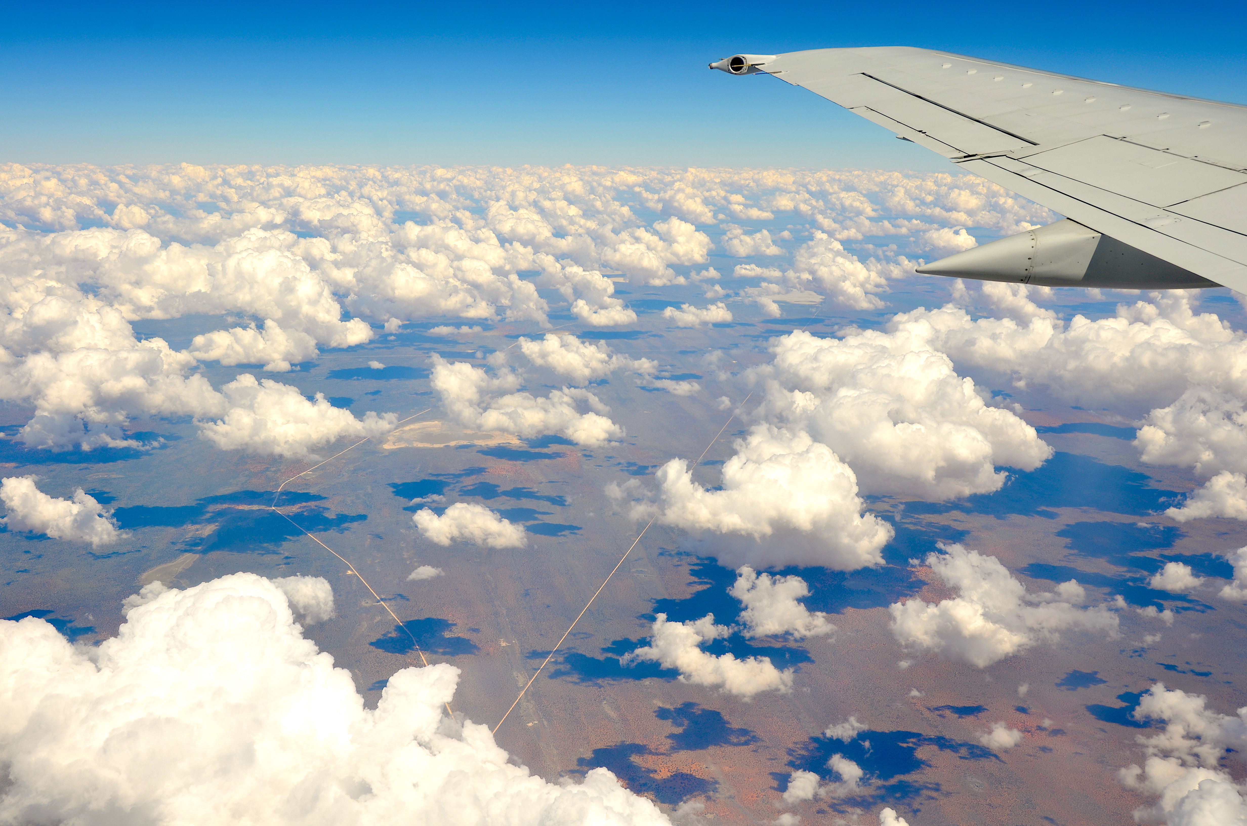 Wolken über der Kalahari, Namibia